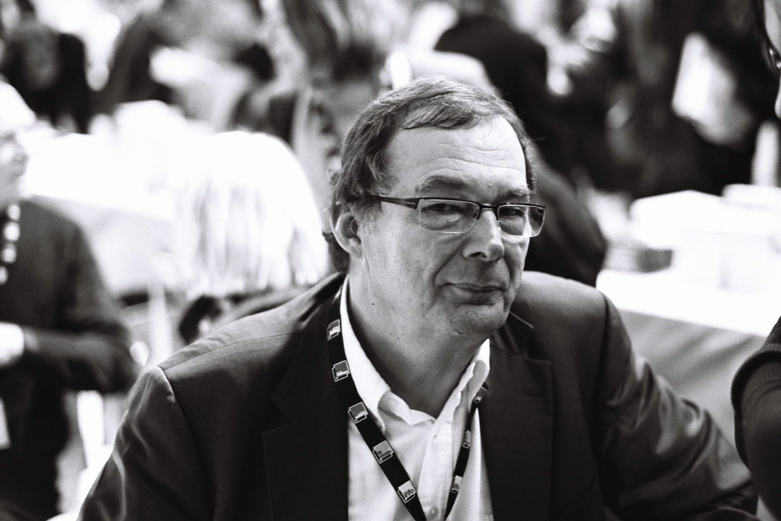 Bernard Lecomte au salon du livre Radio France, 26 novembre 2011